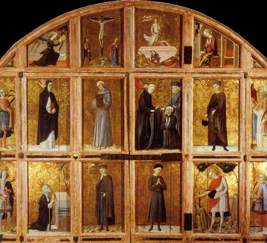 du peintre Il Vecchietta. Arliquiera (armoire peinte qui servait à abriter les reliques) (1445)